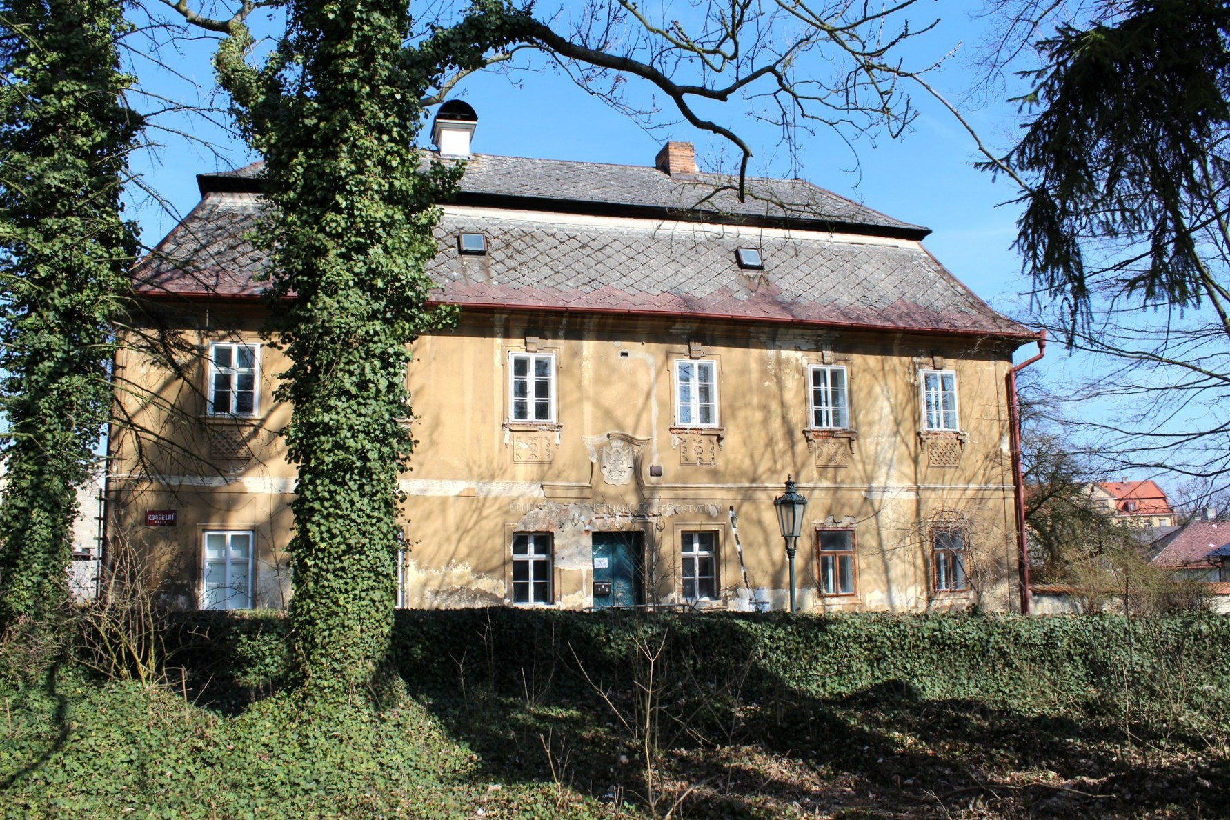 Bělá, kostel Povýšení sv. Kříže